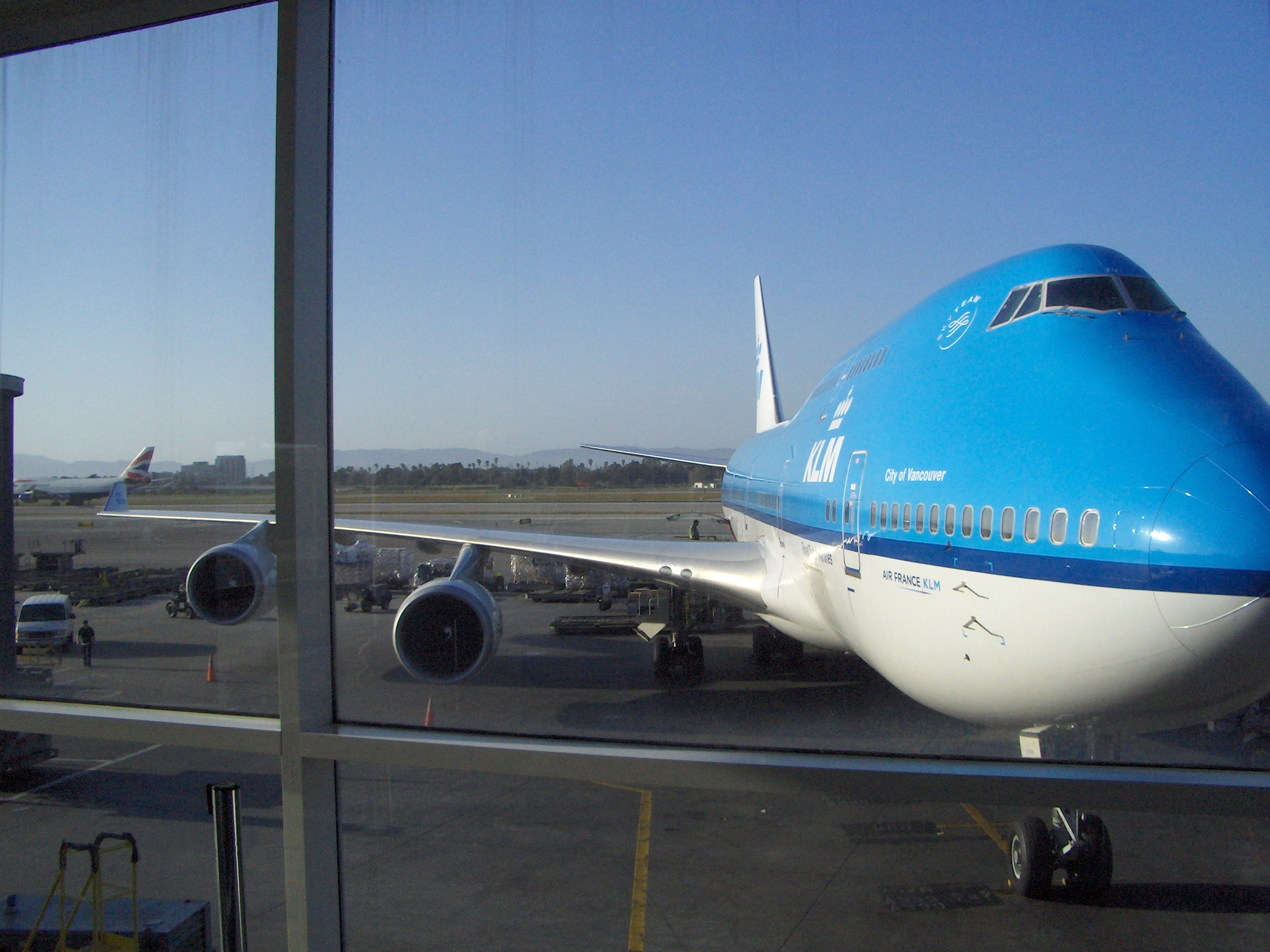 KLM at Terminal 2 at LAX